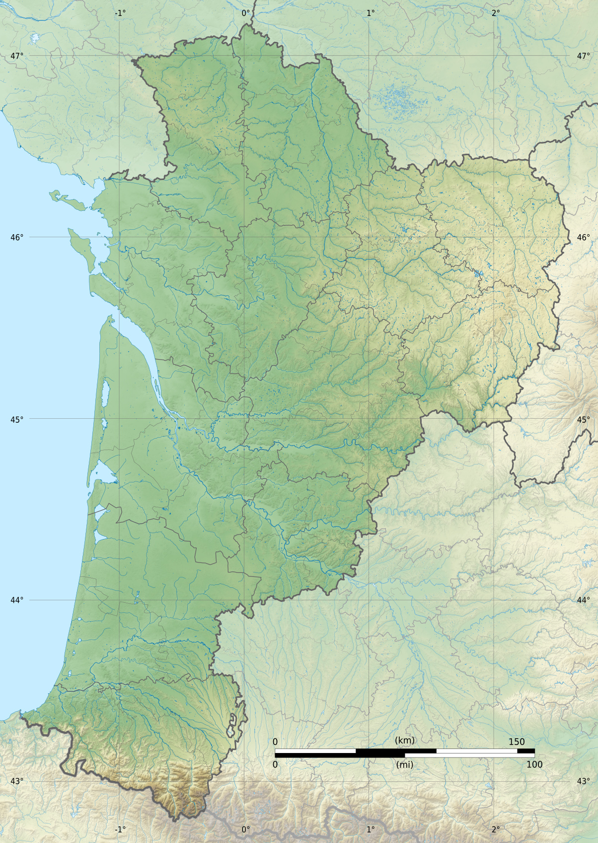 Carte physique vierge de la région Aquitaine-Limousin-Poitou-Charentes, France, destinée à la géolocalisation. Projection "Géoportail" (projection équirectangulaire à la latitude de référence 46.5° Nord) Limites géogrpahiques de la carte : West: -1.952 E East: 2.835 E North: 47.307 N South: 42.664 N